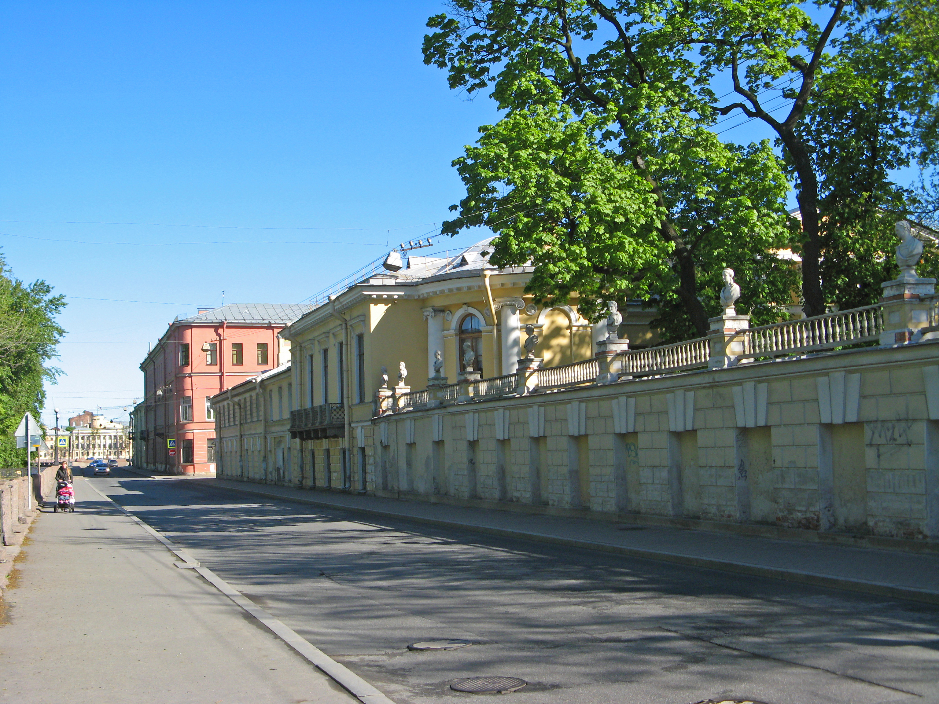 Дворец Бобринских. Ограда с бюстами: набережная Ново-Адмиралтейского канала, 6, Адмиралтейский район, Санкт-Петербург